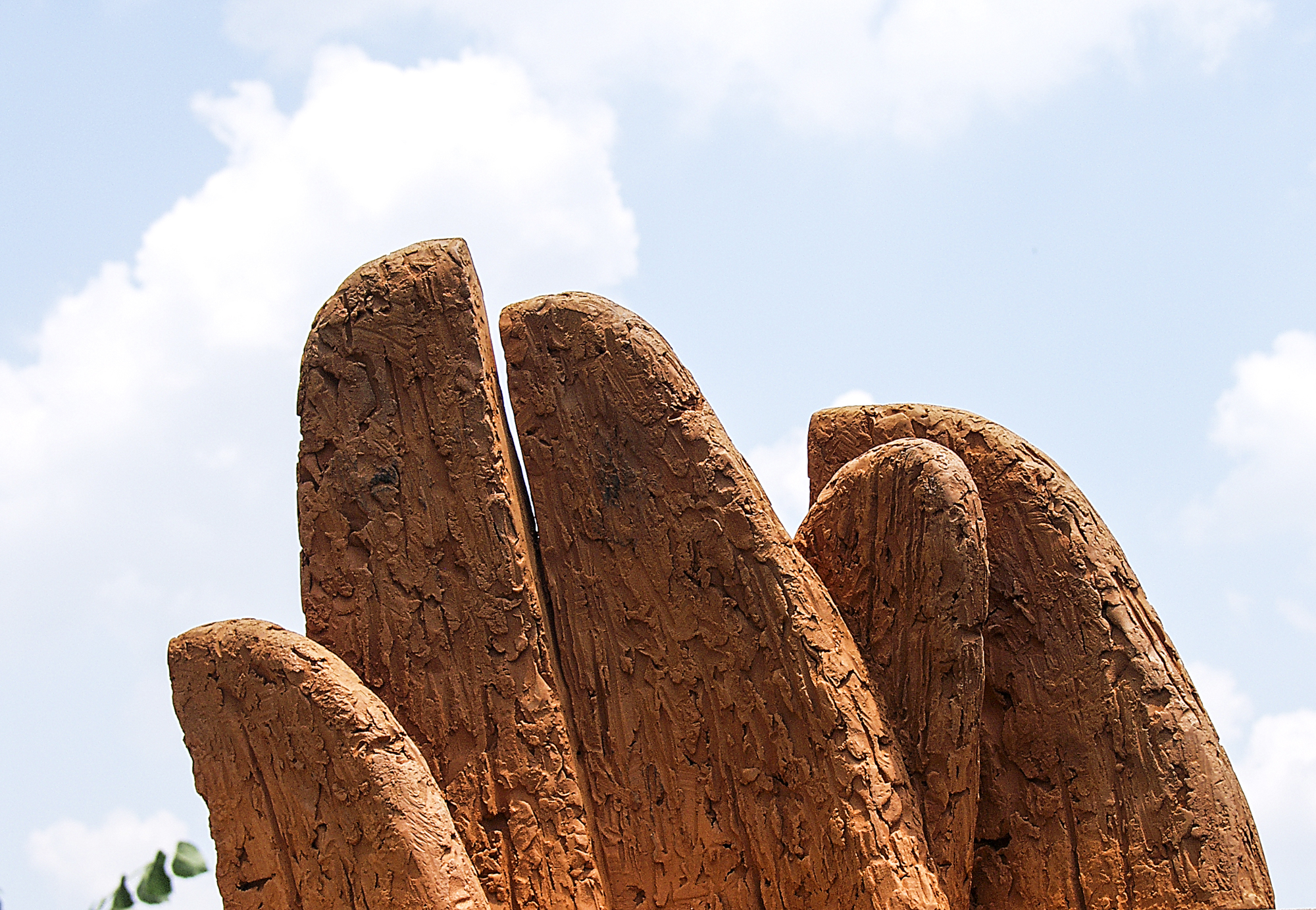 Nedosanjani san, 2009, Terakota